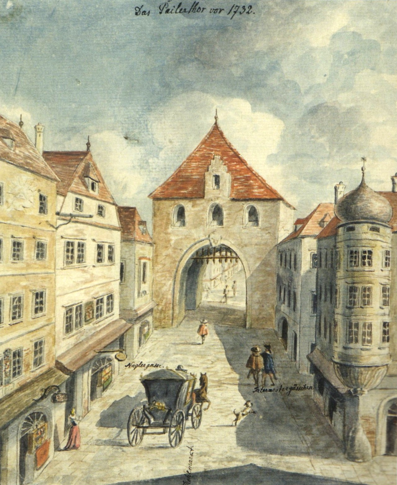 Das Peilertor in Wien vor 1732